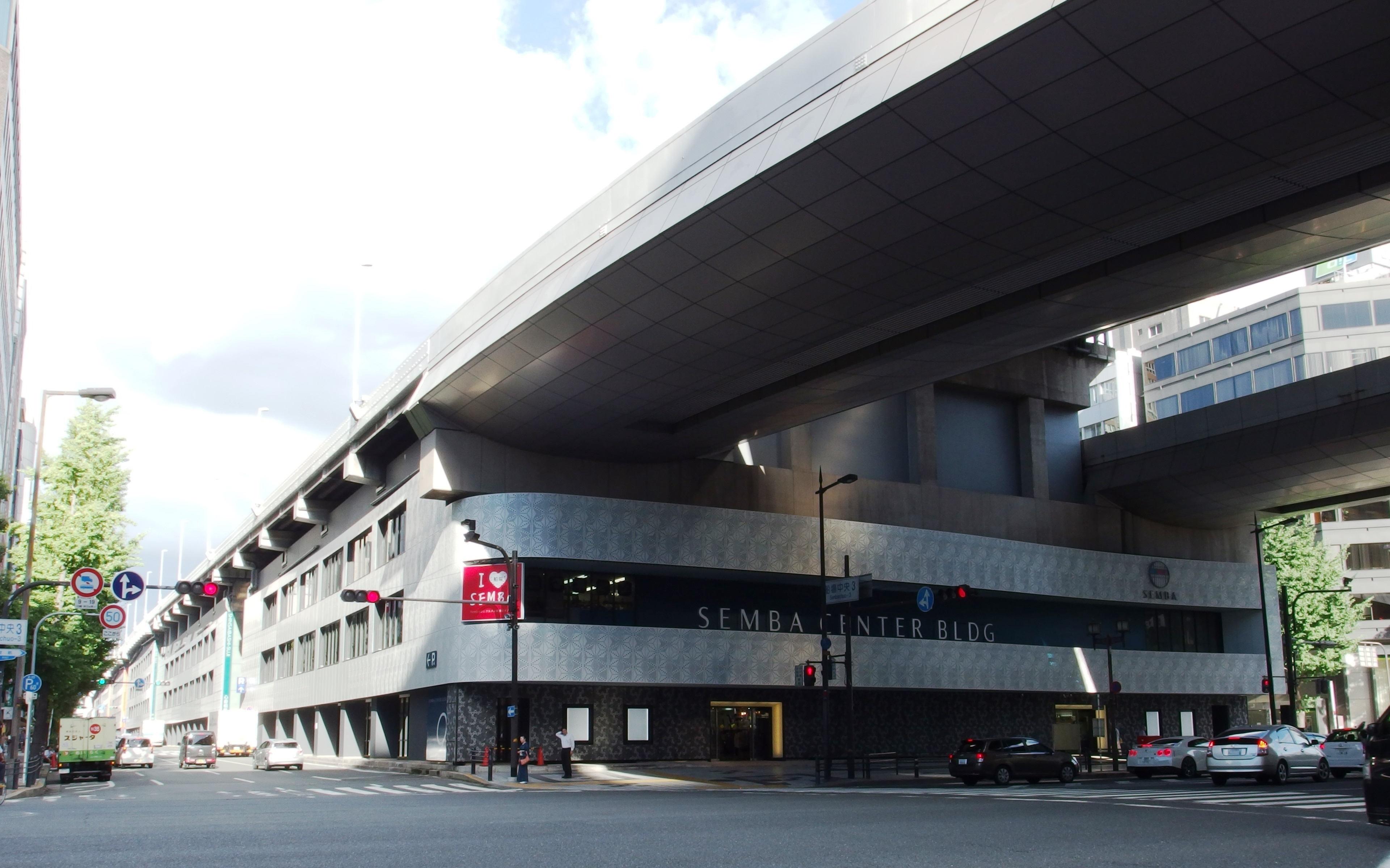 船場センタービル9号館, 大阪府, 大阪市